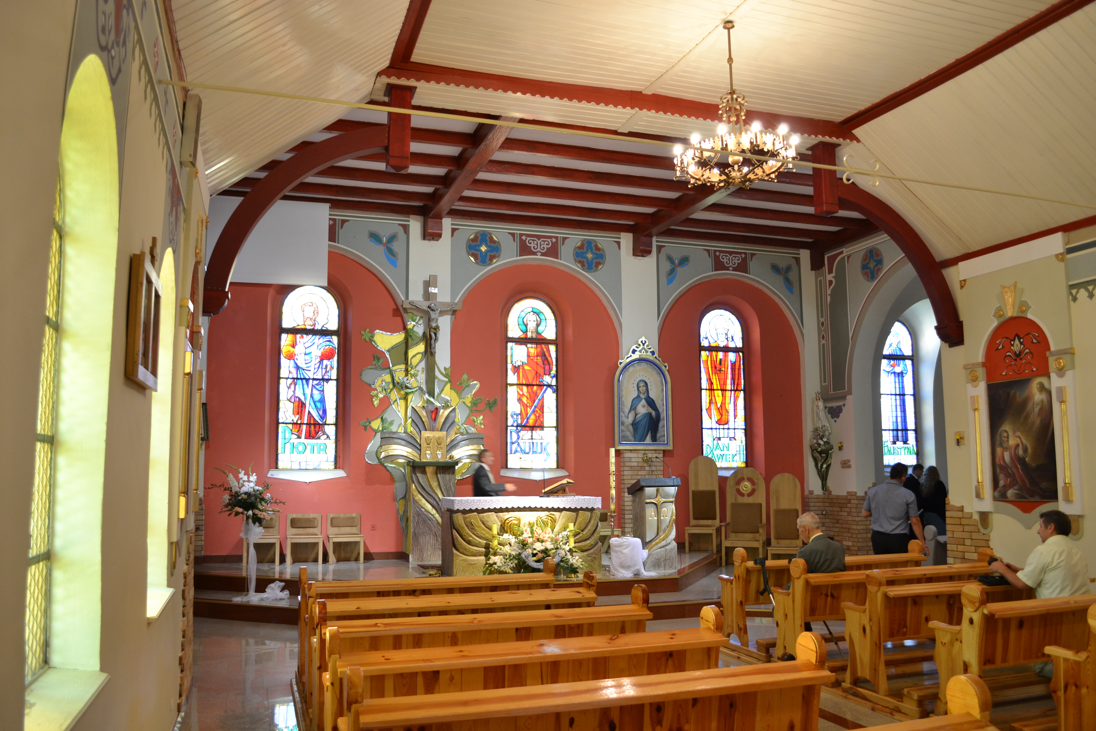 prezbiterium kościoła św. Pawła Apostoła w Drawsku Pomorskim